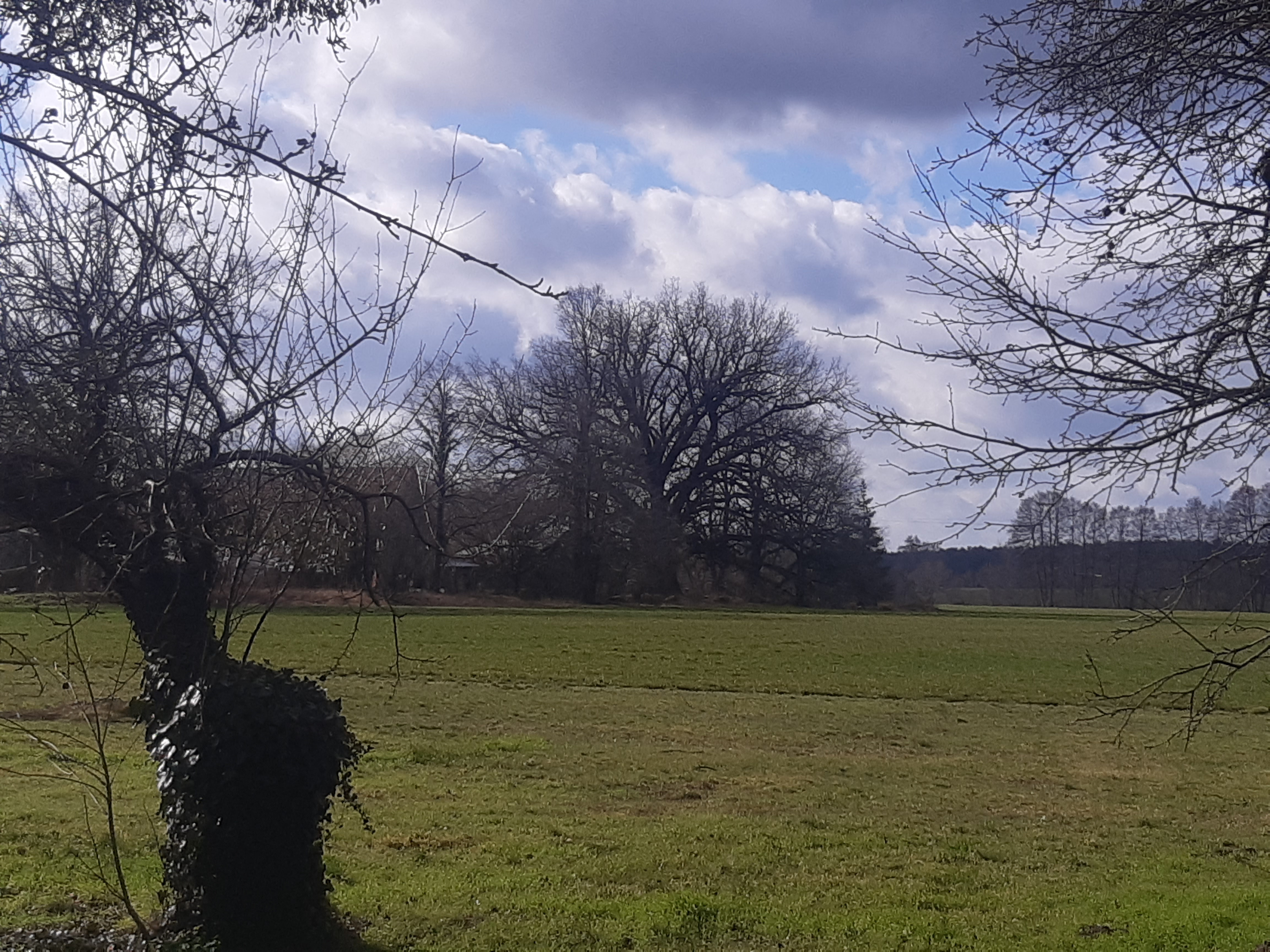 Eiche